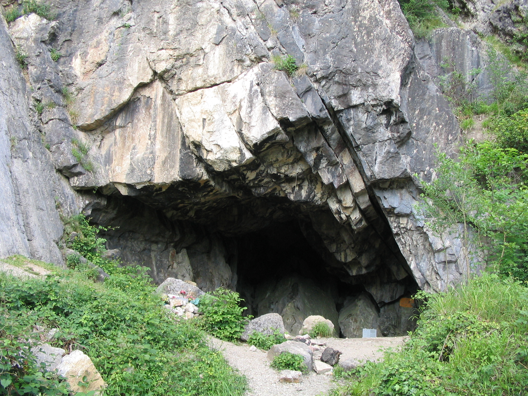 Porche de la grotte Sainte-Anne à Tilff (Liège/Belgique)